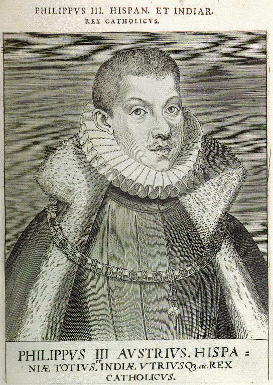 Philipp III. von Spanien